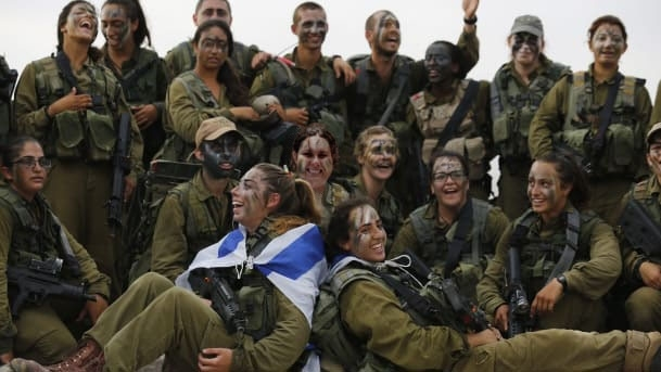 Comando Especial Sionista del Ejército Radial Israeli